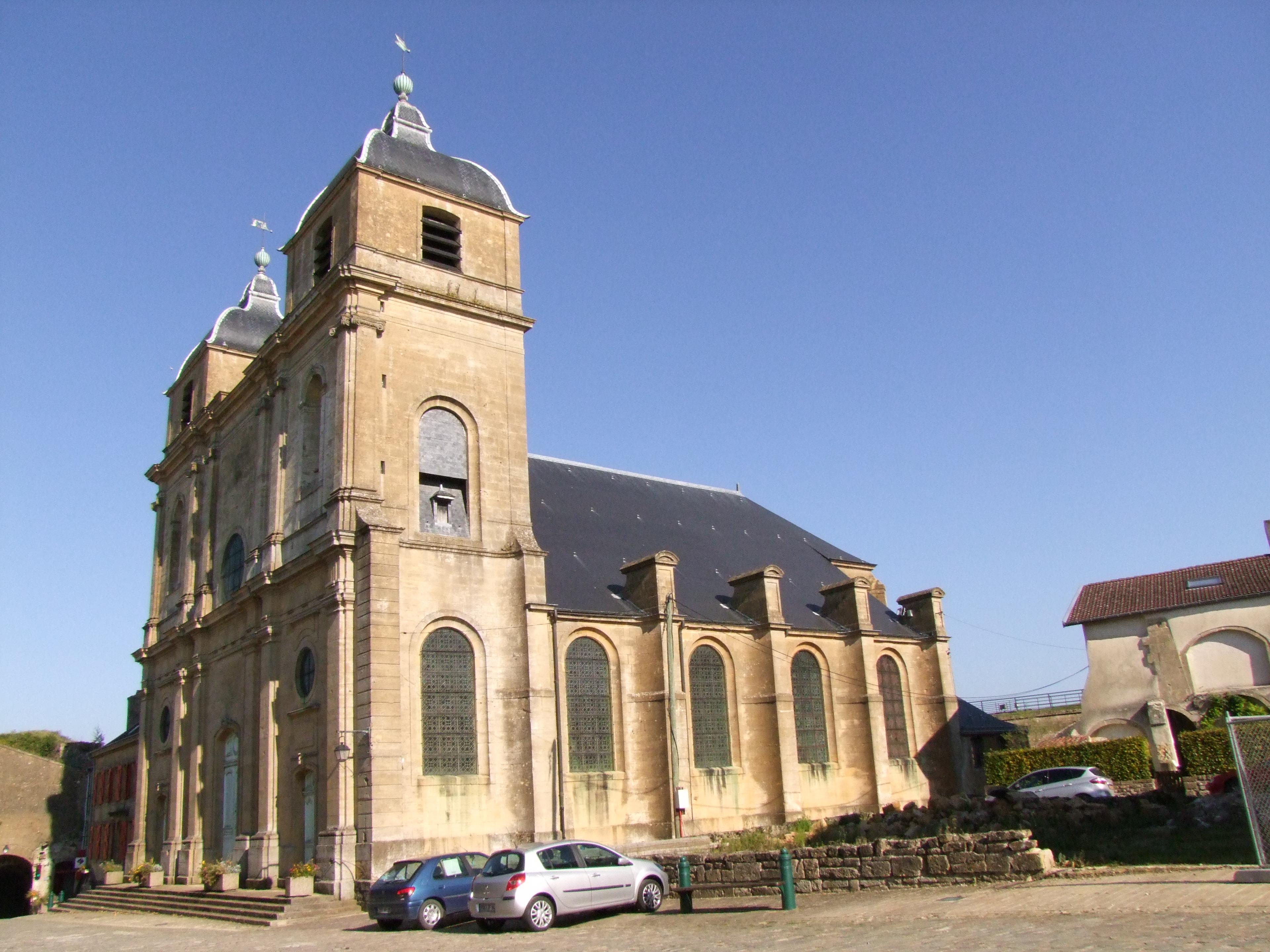 Église Saint-Martin, façade sud et tour, Montmédy, Meuse, France